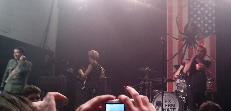 My Chemical Romance en uno de los primeros conciertos de la gira World Contamination Tour, realizado en Edimburgo, Escocia, Reino Unido.